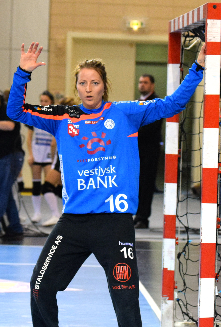 Silje Solberg Le 03 avril 2016 lors du match aller de demi-finale de la Coupe des vainqueurs de coupe de handball Issy Paris Hand / Team Tvis Holstebro